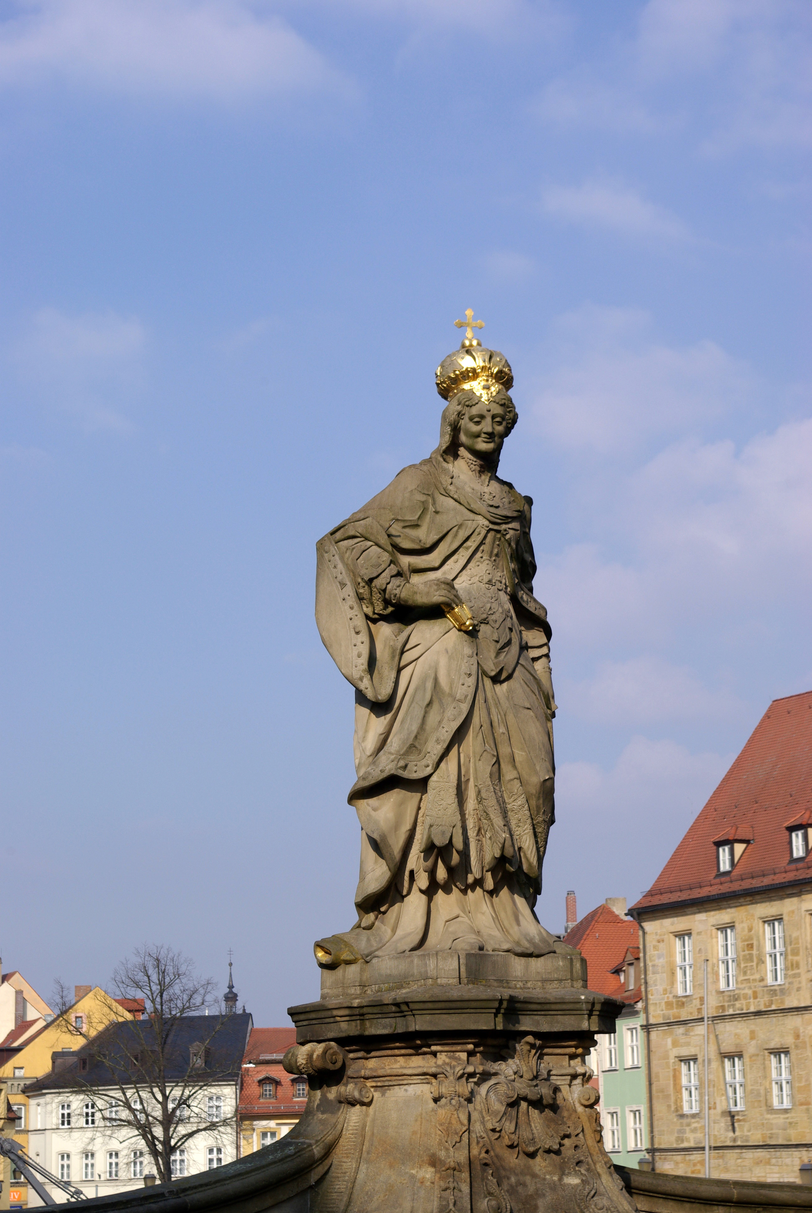 Statue der Kunigunde von Luxemburg, Bamberg, "Untere Brücke"